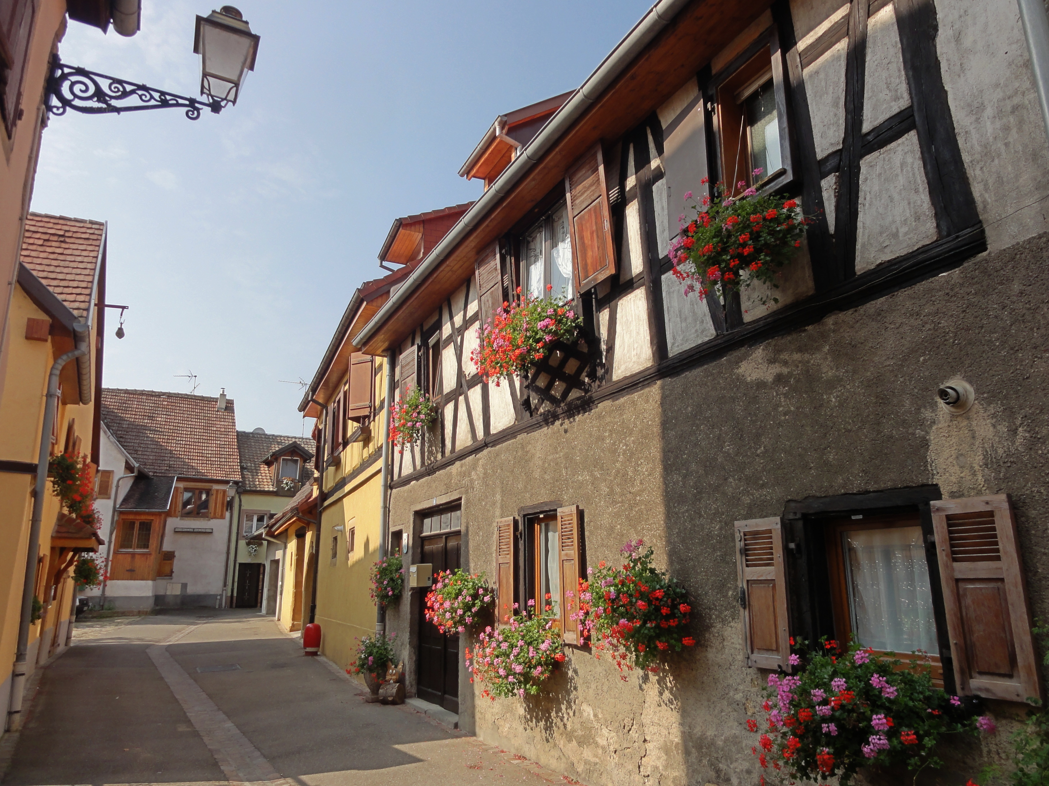 Alsace, Haut-Rhin, Rouffach, Impasse des Juifs.